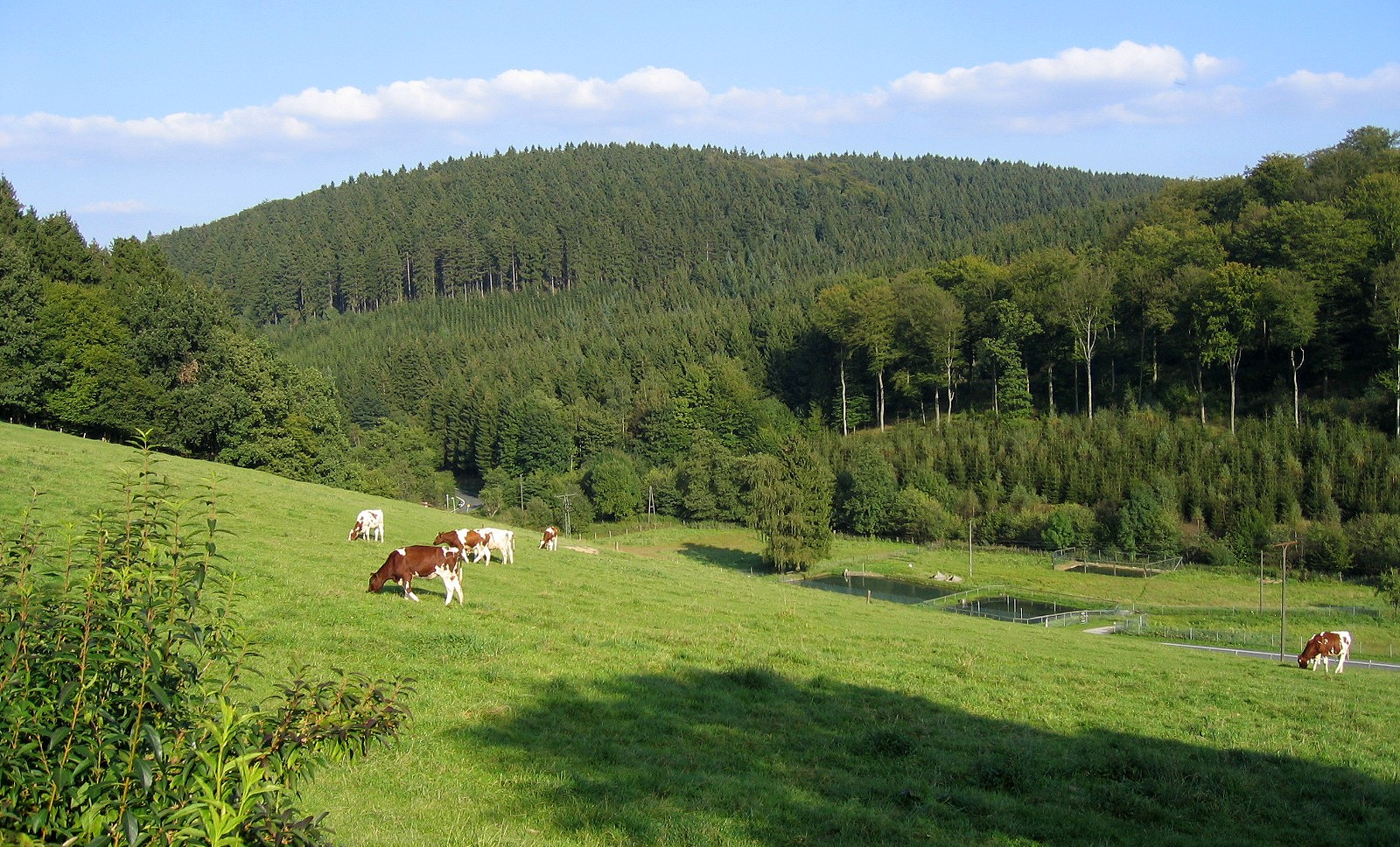 Naturpark Homert, Ortsteil Heppingsen in Hemer.